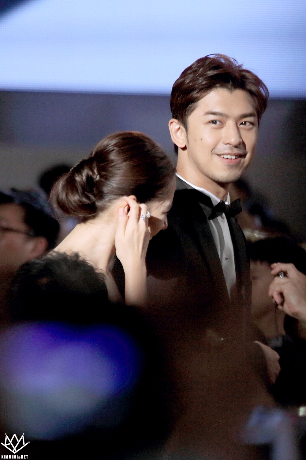 151001 부산국제영화제 개막식 레드카펫